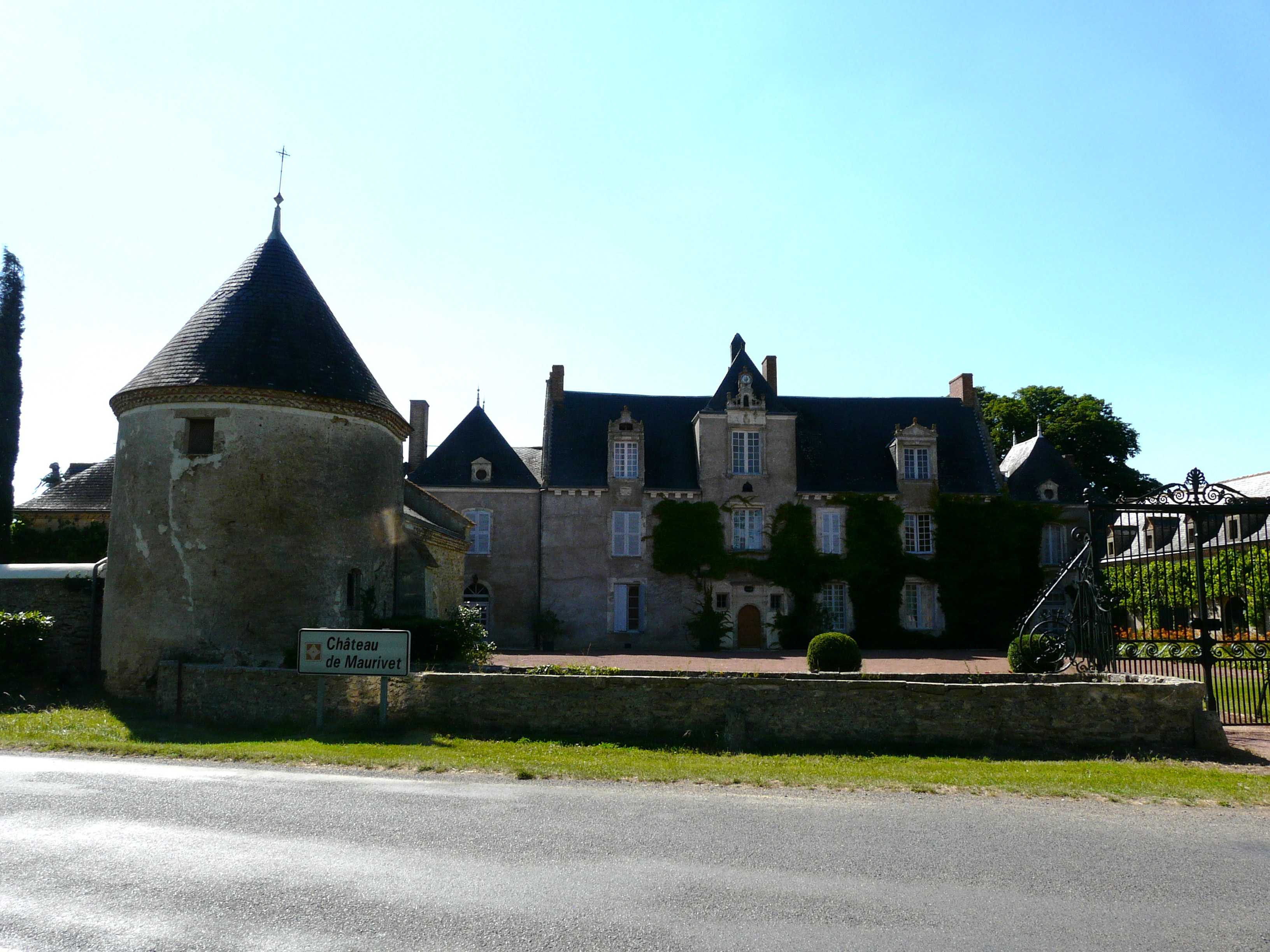 Le château de Maurivet, Oroux, Deux-Sèvres, France